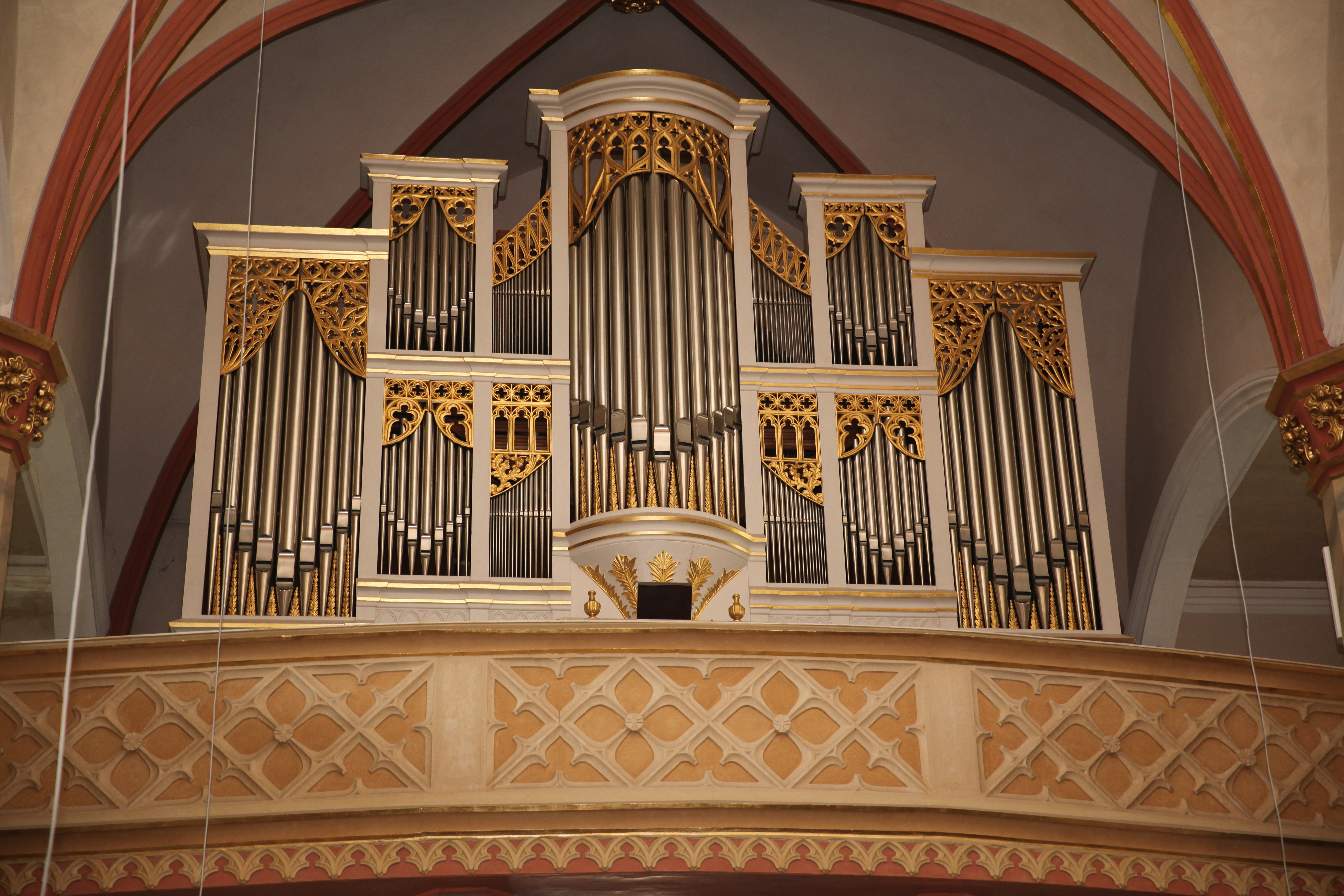 Orgel, Evangelische Stadtkirche St. Georg in Neustadt bei Coburg